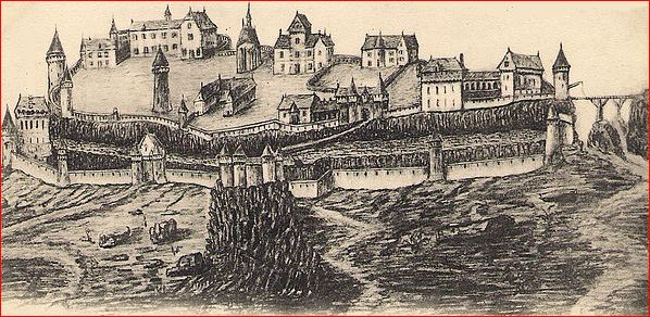 Château de Carlat, gravue d'un dessin restituant l'état au XVIe siècle.